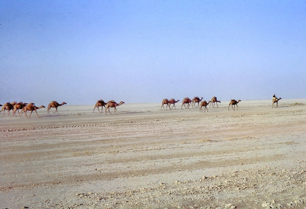 Caravane dans le désert du Registan (Afghanistan) en 1969